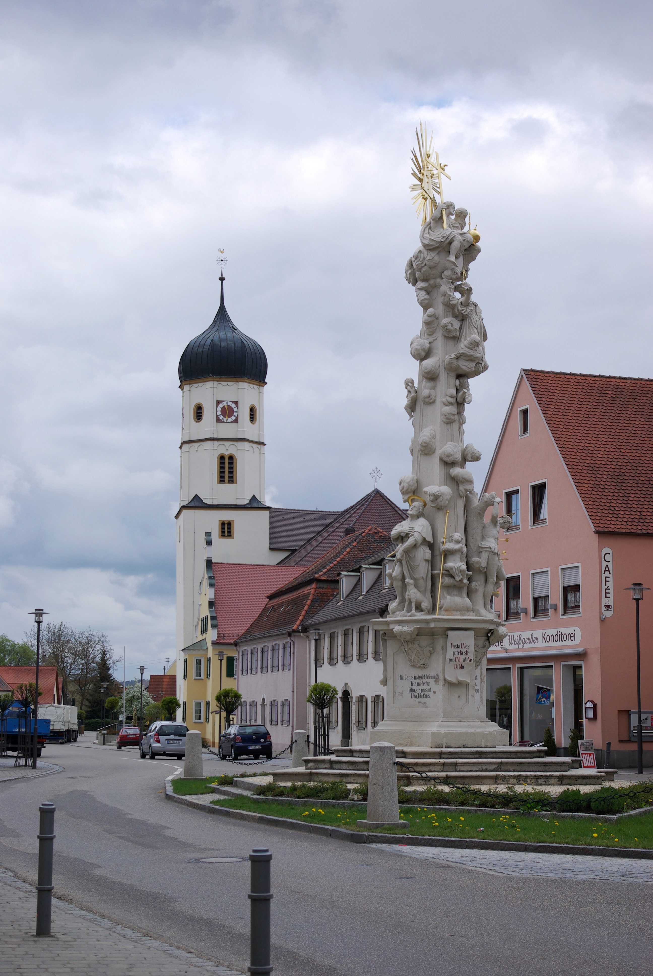 Wallerstein, Hauptstraße, die linke Inschrift bedeutet: Hier wacht der Hund, verteidigen die Pfeile, [und] heilen die Lilien; so helfen Lilien, Pfeile, [und] der Hund. Das Chronogramm rechts heißt: Die wüste Seuche sei fern von Heimat und Haus und ergibt 1772, links der Heilige Rochus, rechts der Heilige Sebastian